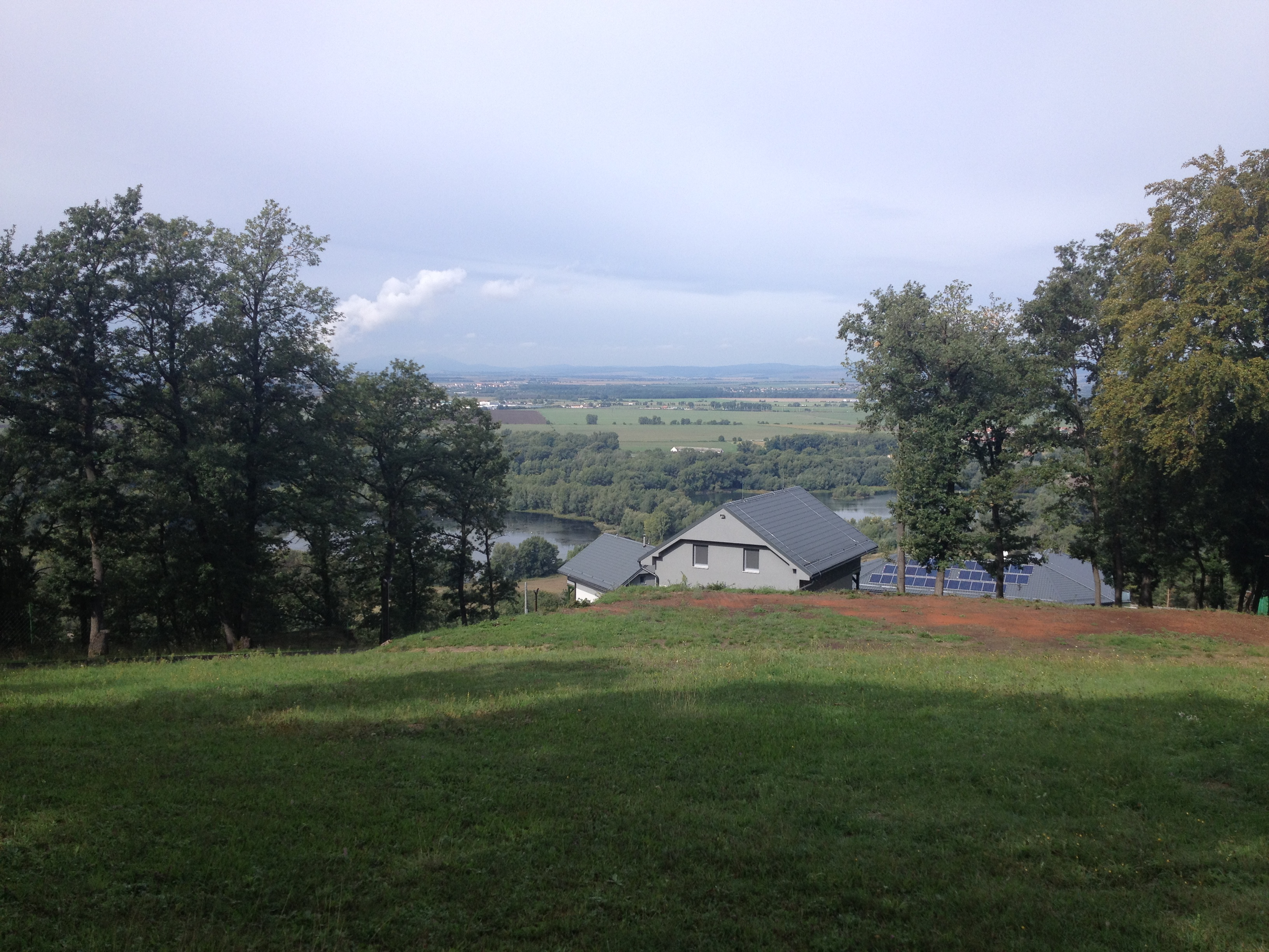 922 31 Jalšové, Slovakia